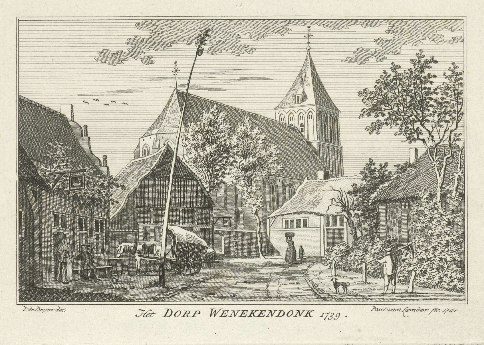 Dorfstrasse und Kirche in Kevelaer-Winnekendonk 1739. Links ein Wirtshaus, davor ein Fuhrwerk und ein Maibaum.